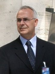 Jozo Radoš na svečanosti podizanja NATO-ve zastave u Zagrebu